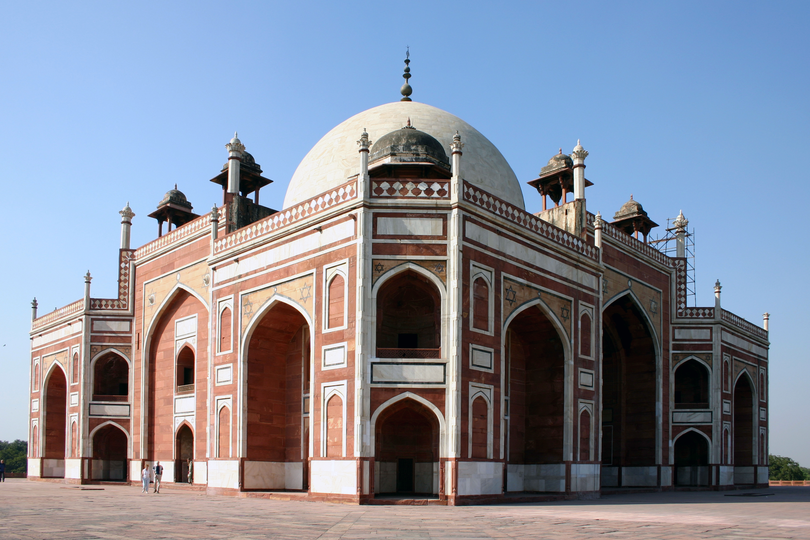 Mausoleum des Humayun, erbaut 1564-1571, in Delhi